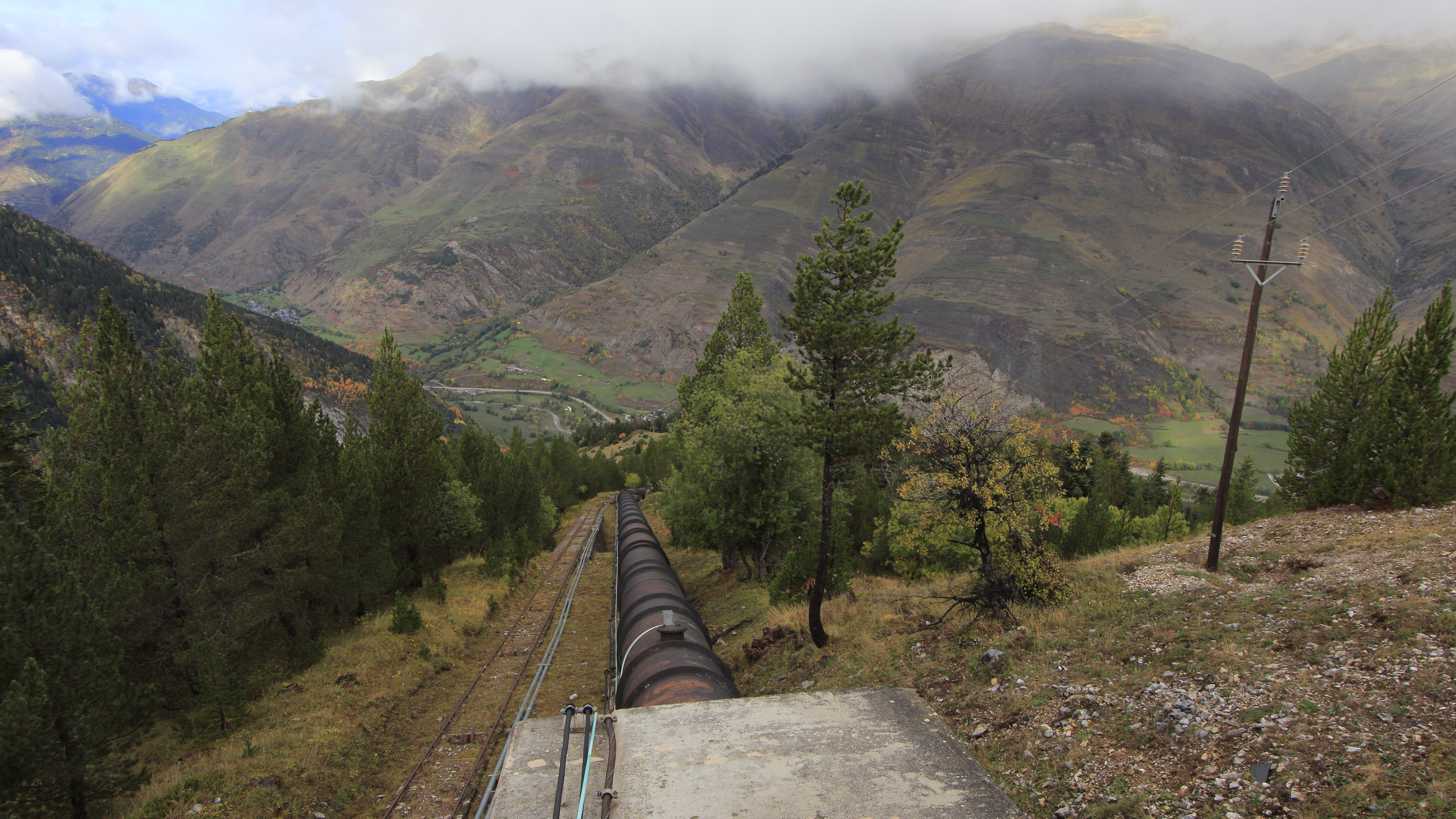 Canonada forçada de CH Artites, Vall d'Aran (Catalan Pyrenees)